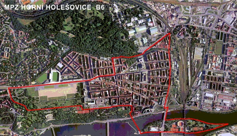 Mapa městské památkové zóny Dejvice, Bubeneč, horní Holešovice, část horní Holešovice.